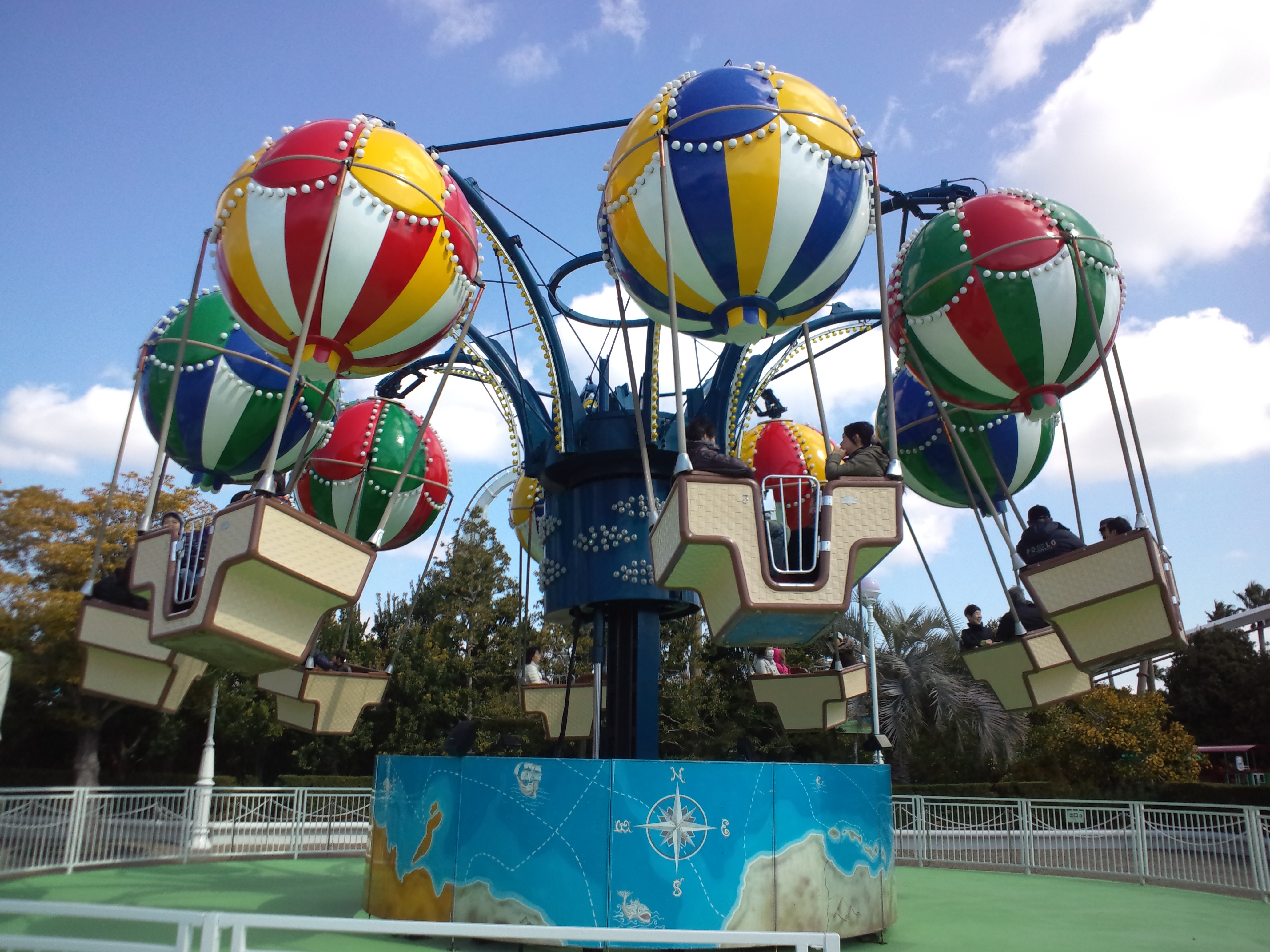 志摩スペイン村、パルケエスパーニャ アミーゴバルーン